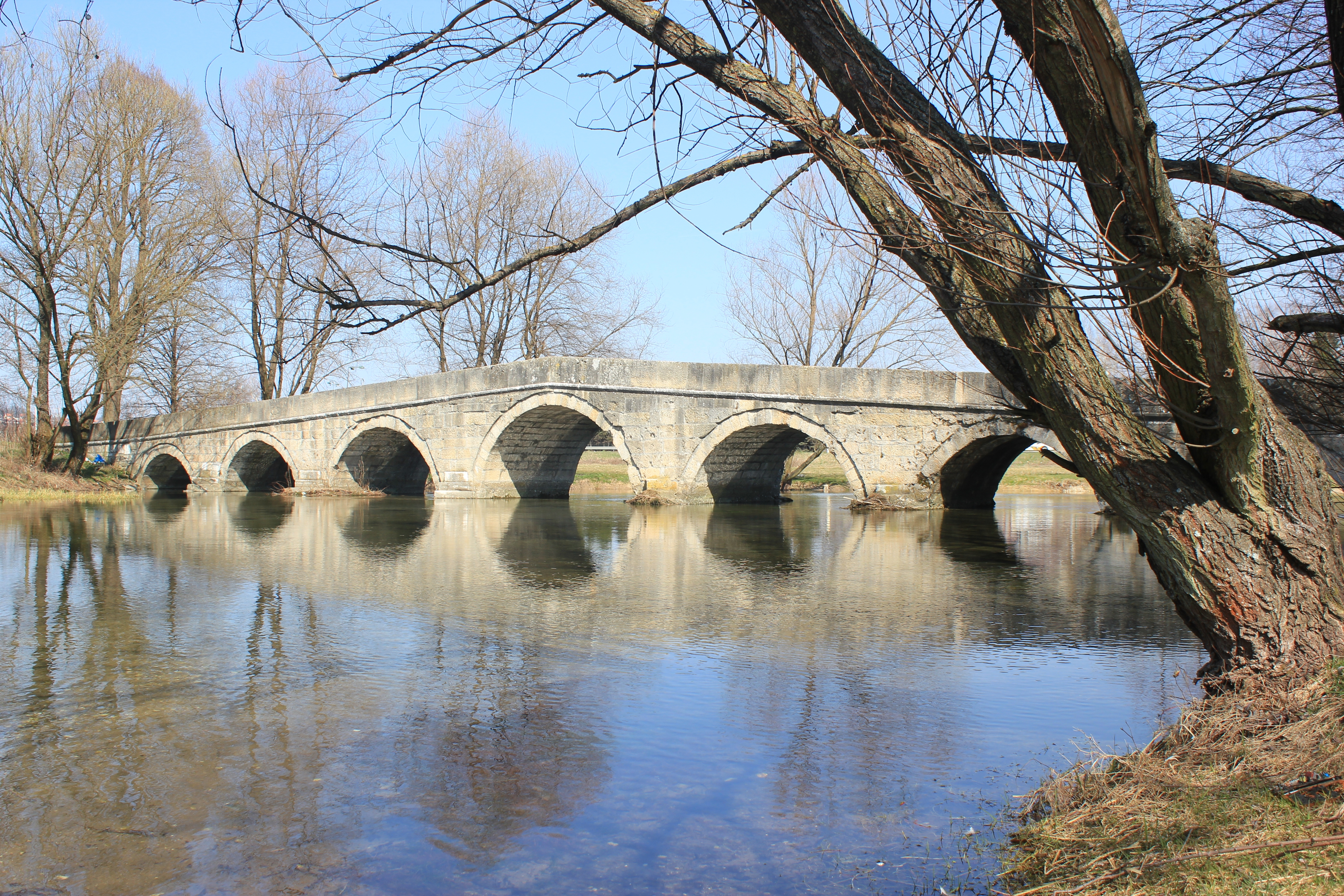 Die Steinbogenbrücke Rimski most über die Bosna bei Ilidža.